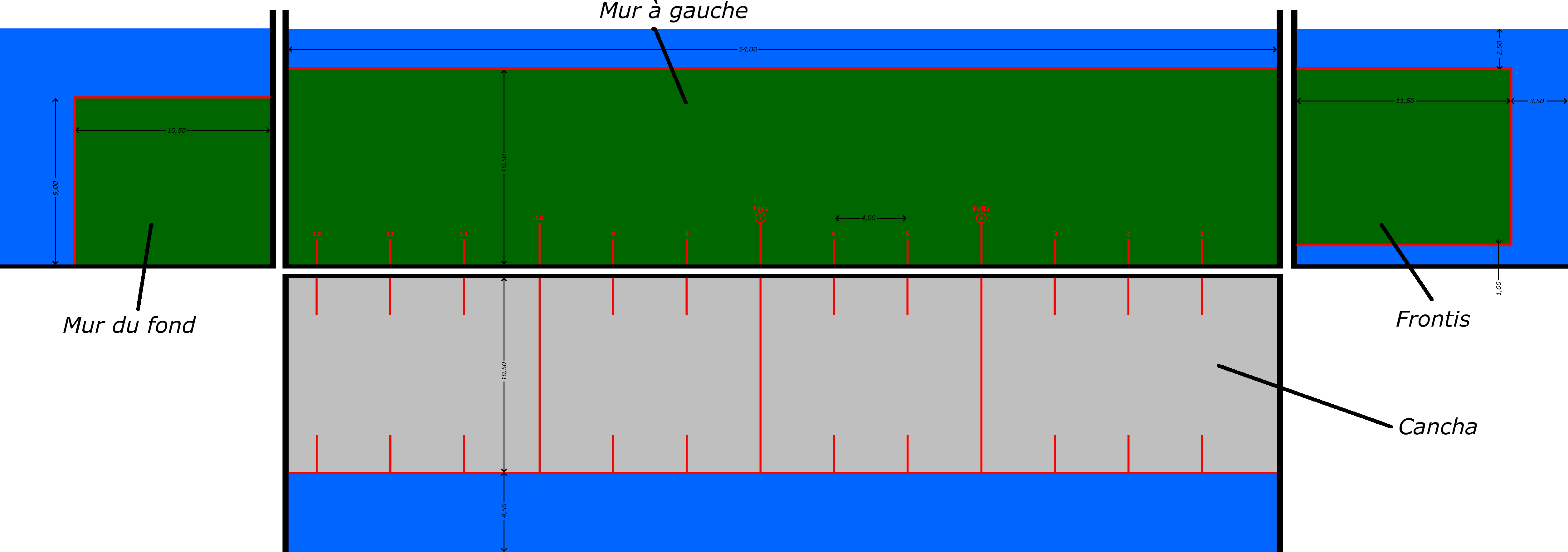 Jai alai, plan, présentation